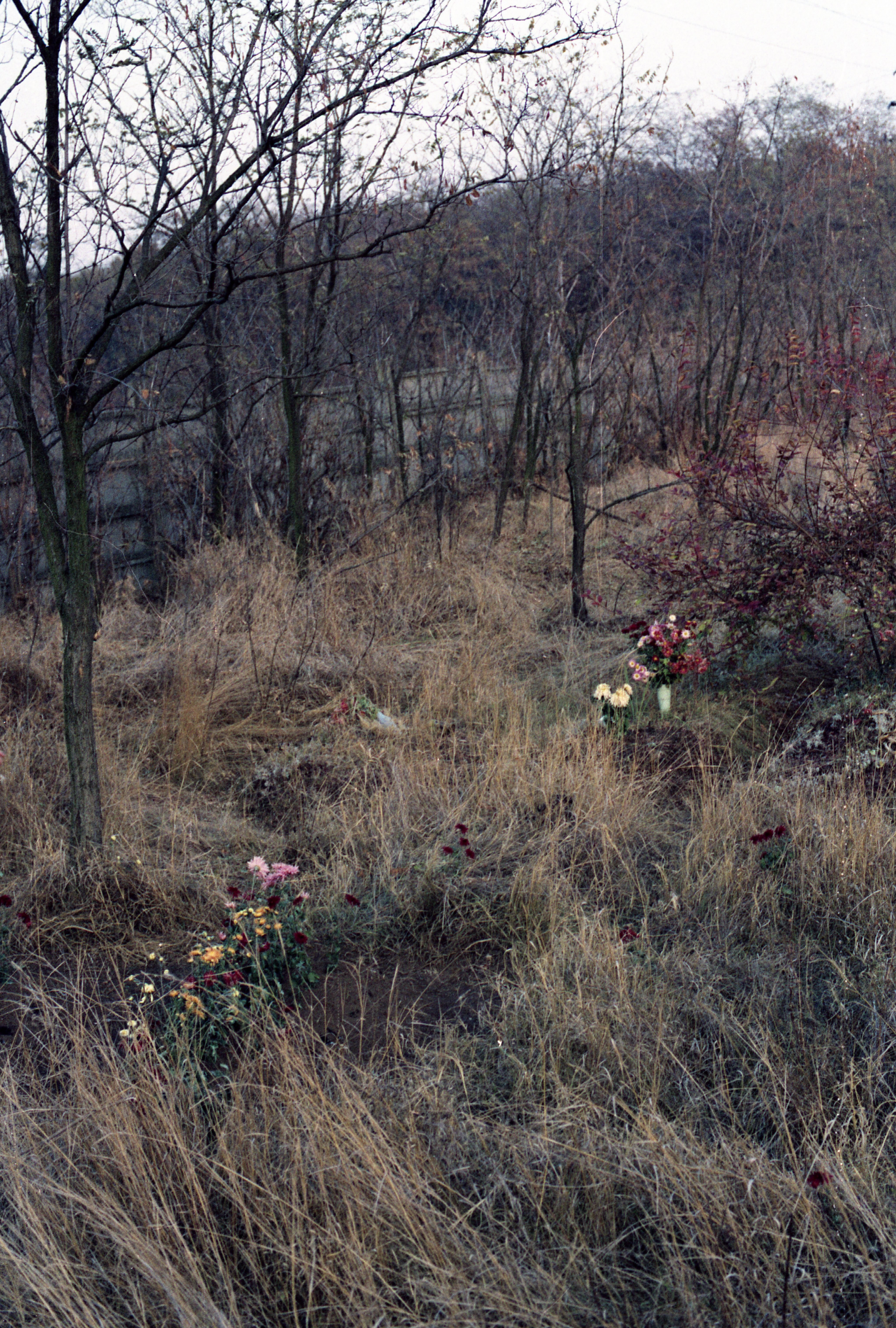 Új Köztemető, 301-es parcella. Location: Hungary, Budapest X. Tags: colorful, Budapest, cemetery Title: Új Köztemető, 301-es parcella.